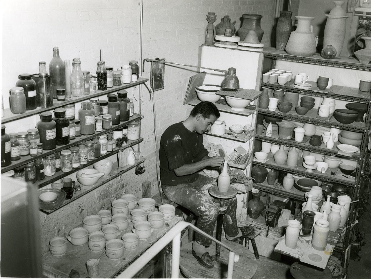 Jan van der Vaart aan het werk in zijn atelier aan de loevesteinlaan 184 Den Haag (jaren 50)